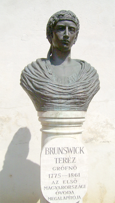 Brunszwik Teréz szobra Budapesten a Logodi utcában.